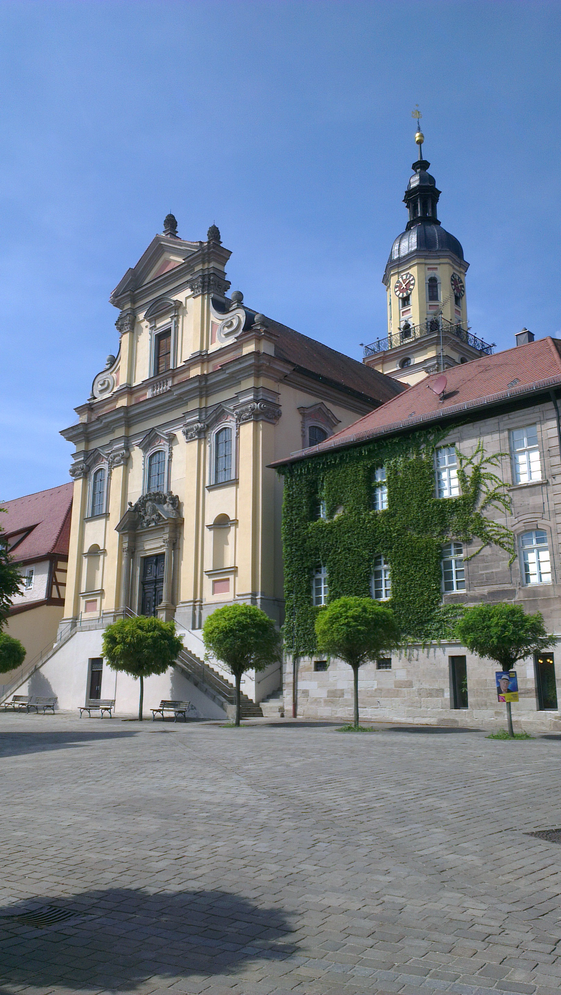 Wilhermsdorf - Kirche St. Martin und Maria mit Turm und Ritterhaus